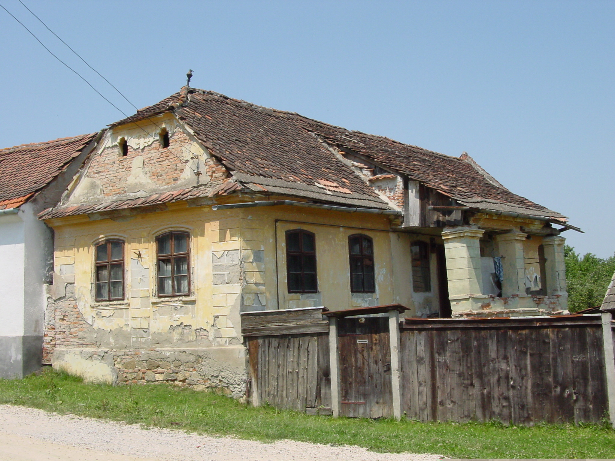 Casă mocănească